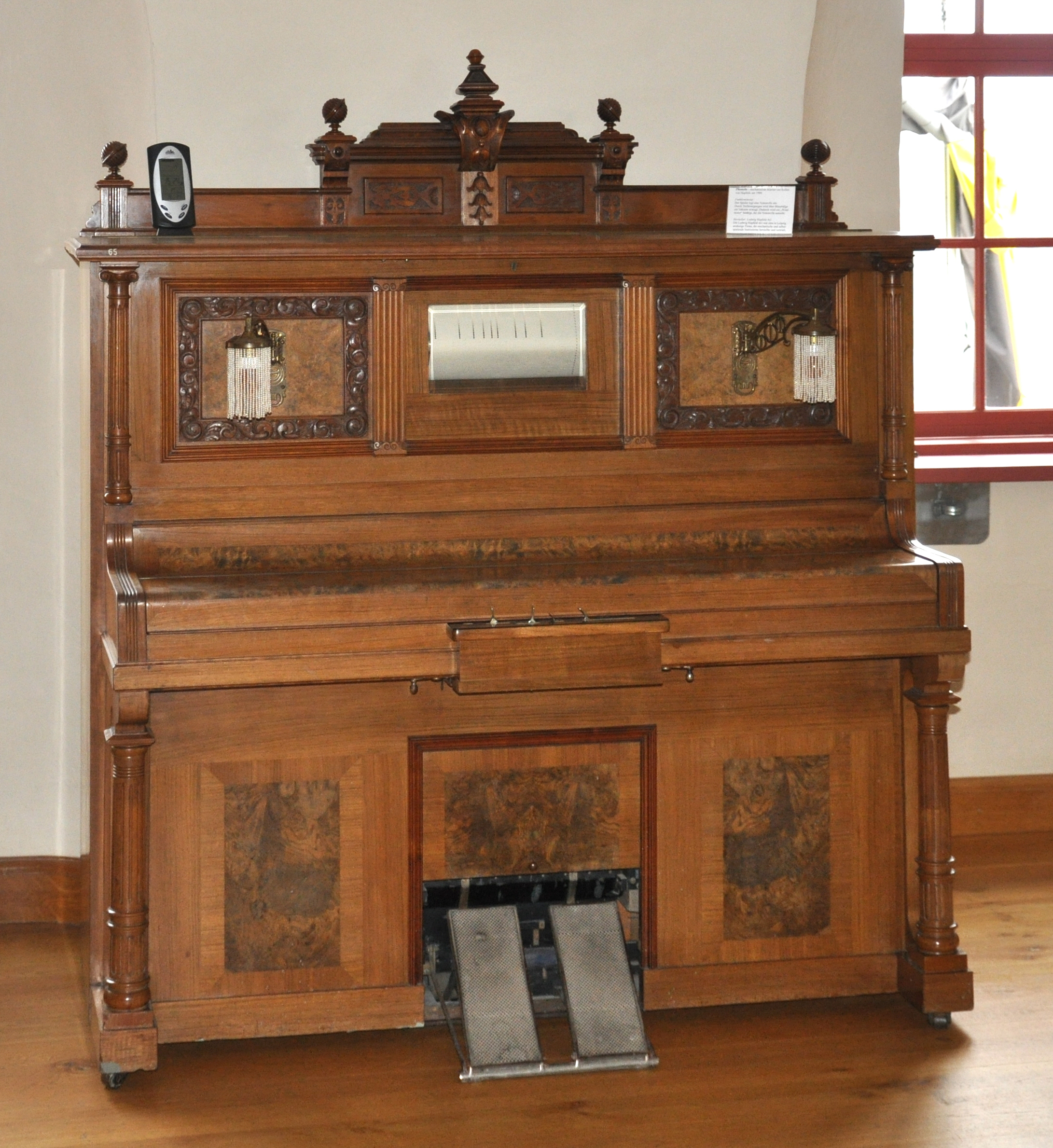 Oelsnitz/Vogtland, Schloss Voigtsberg, Phonola (mechanisches Klavier mit Notenrollen), Ludwig Hupfeld AG, Leipzig, 1900.